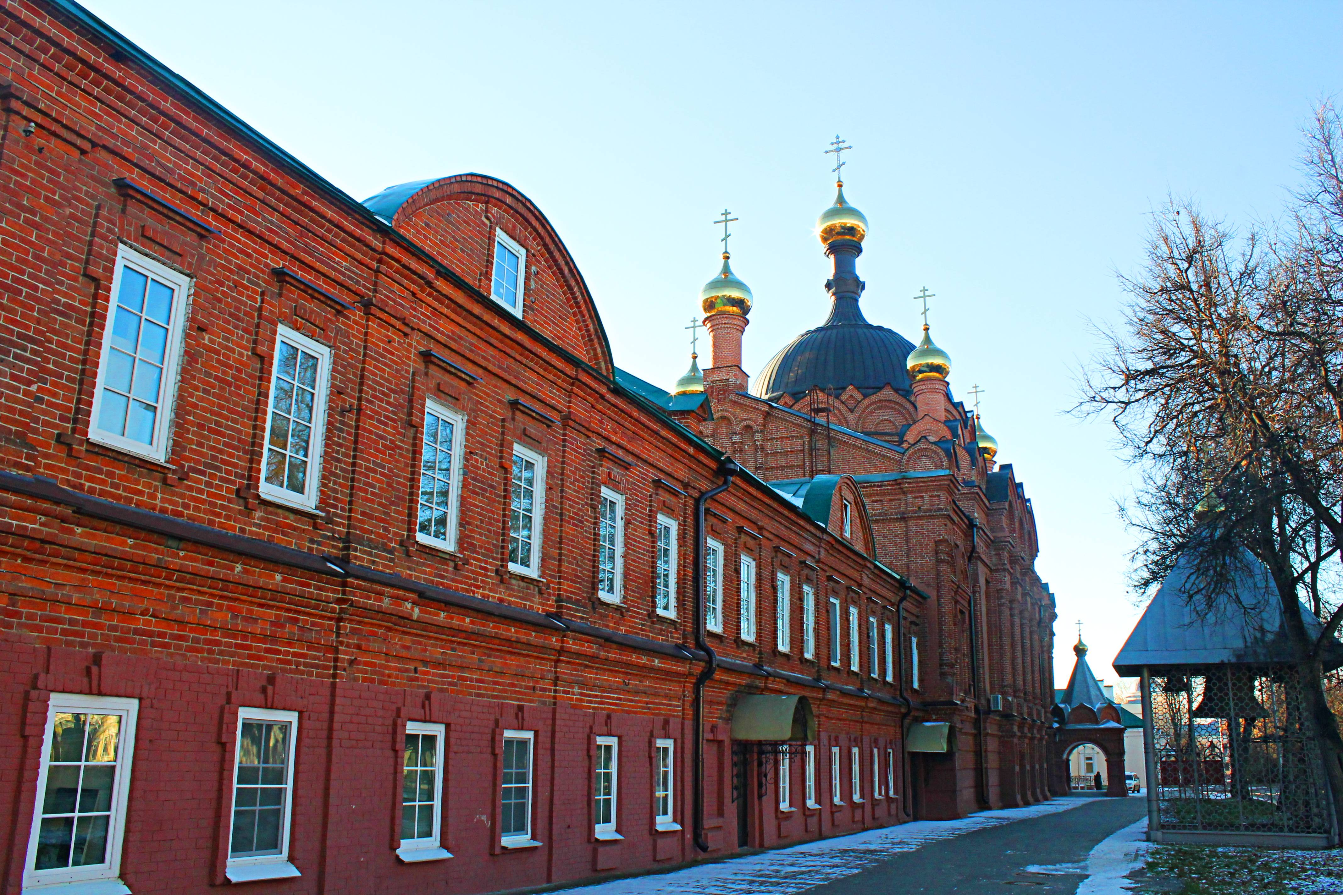 церковь преподобного Серафима Саровского (Троицкая по постановлению) (Нижегородская область, Саров, проспект Мира, 40)